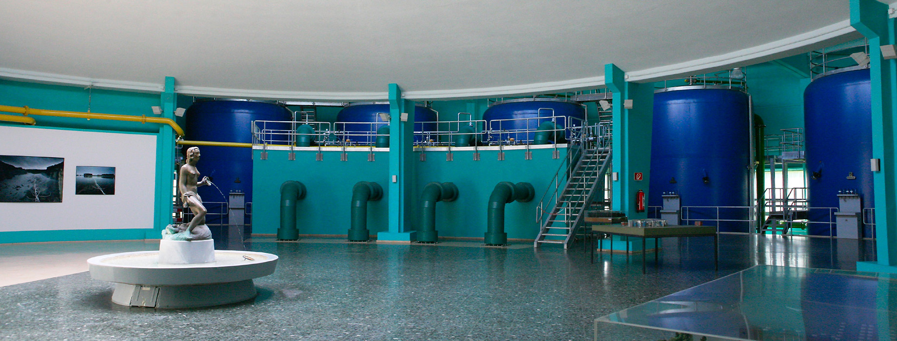 Eingangshalle des Wasserwerks Am Staad